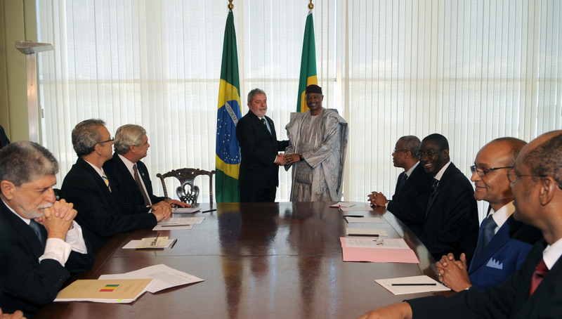 Brasília - O presidente Luiz Inácio Lula da Silva recebe o presidente do Mali, Amadou Tomani Touré, em visita oficial ao país (Antonio Cruz/ABr)